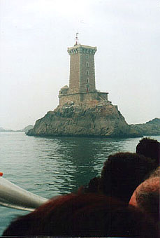 Phare de Triagoz